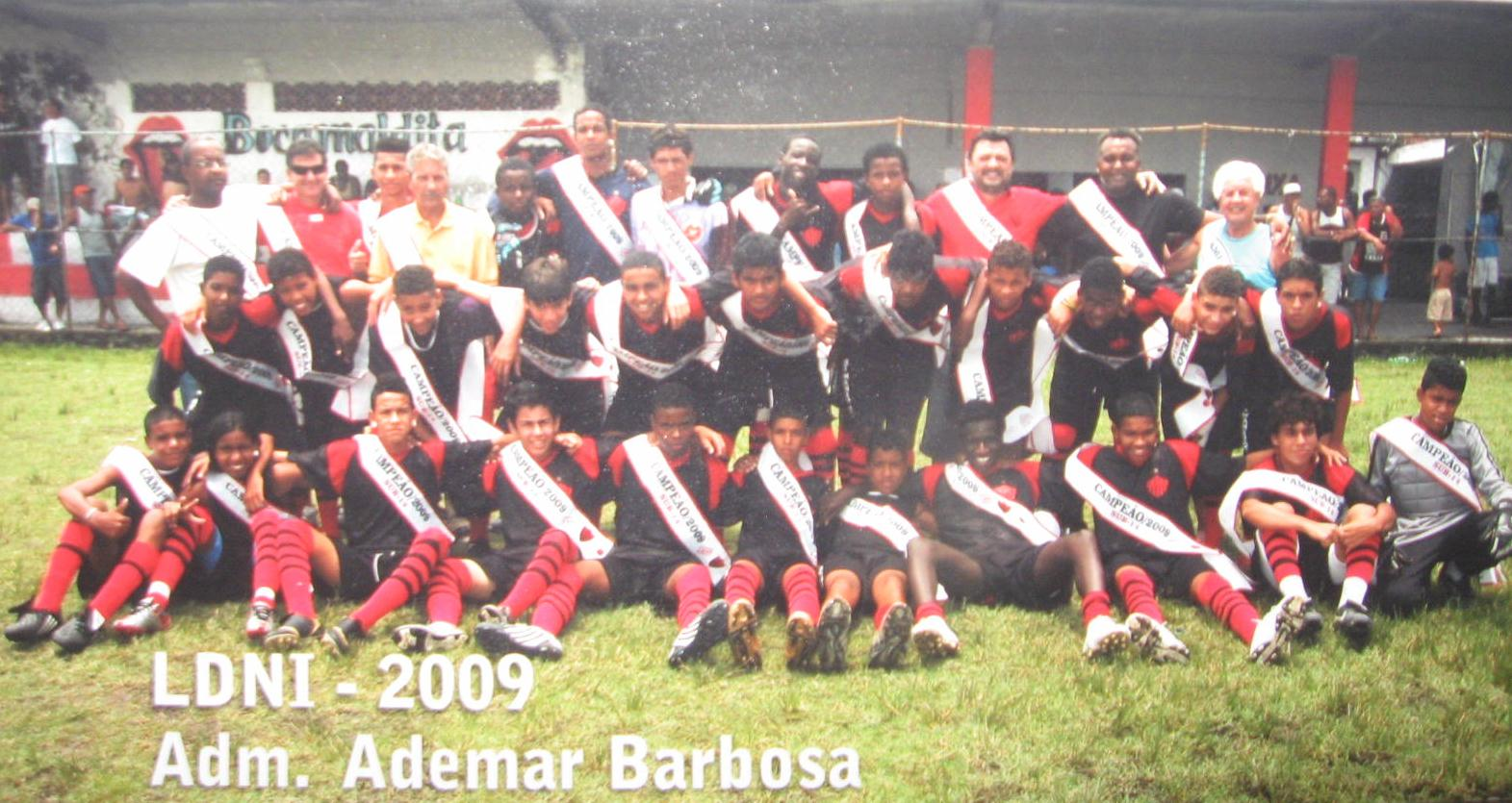 Formação juvenil do Anchieta, campeã em 2009 da Liga Iguaçuana.